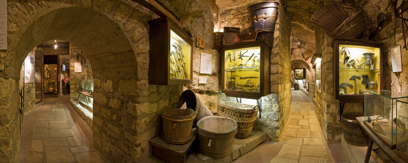 Vue Musée du Vin Paris: panoramique